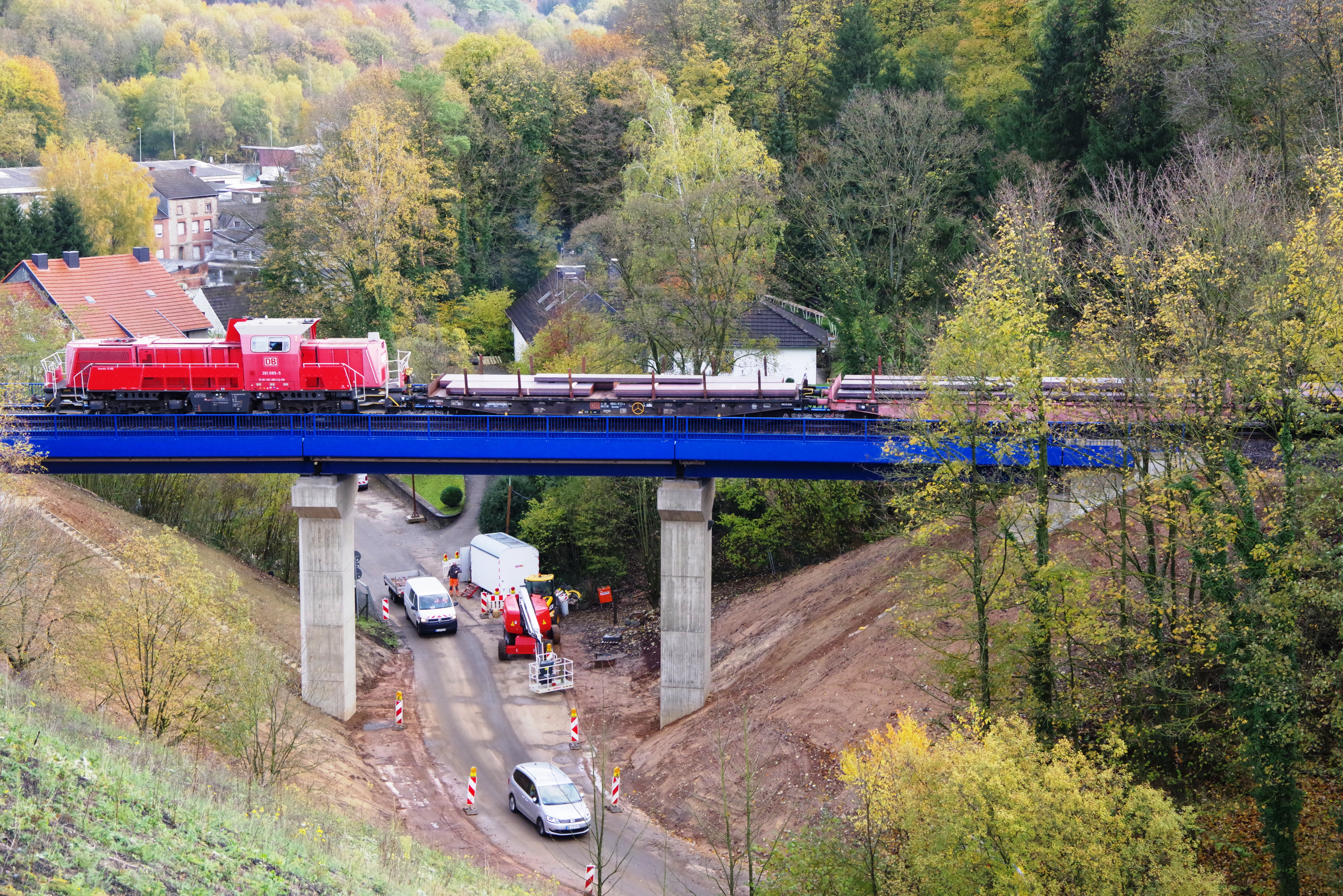 Rüst Viadukt über das Rüstbachtal nach seiner Fertigstellung im November 2019, die erste Fahrt nach Wiederinbetriebnahme im Gütertransport